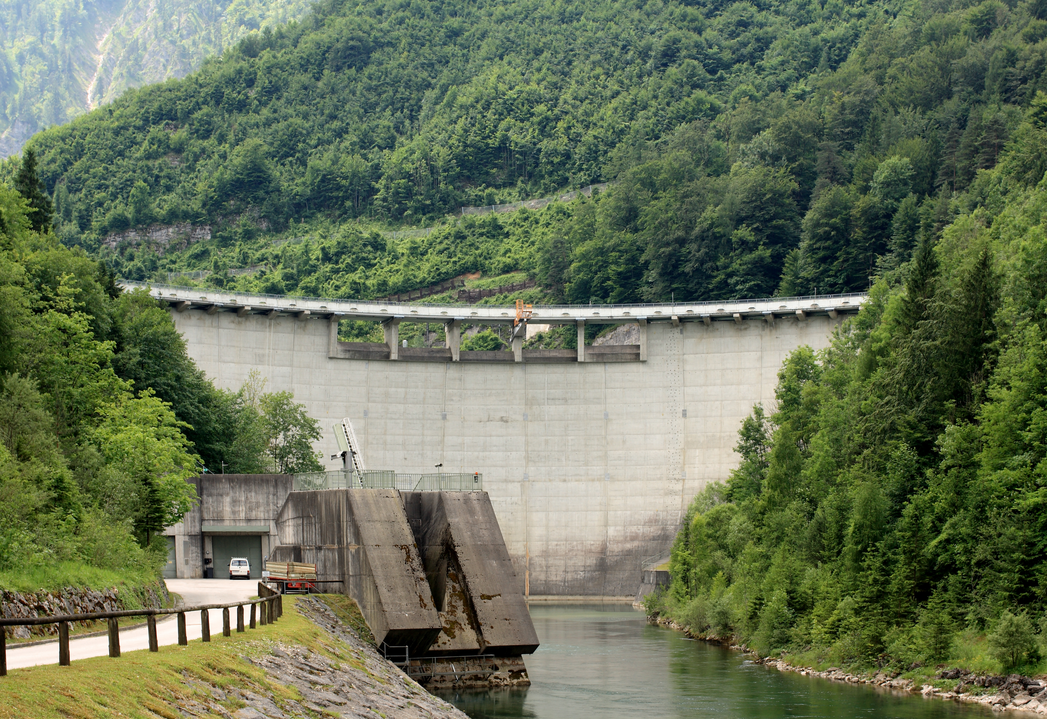 Die Staumauer des Kraftwerkes Klaus von der flussabwärts gelegenen Straßenbrücke aus gesehen